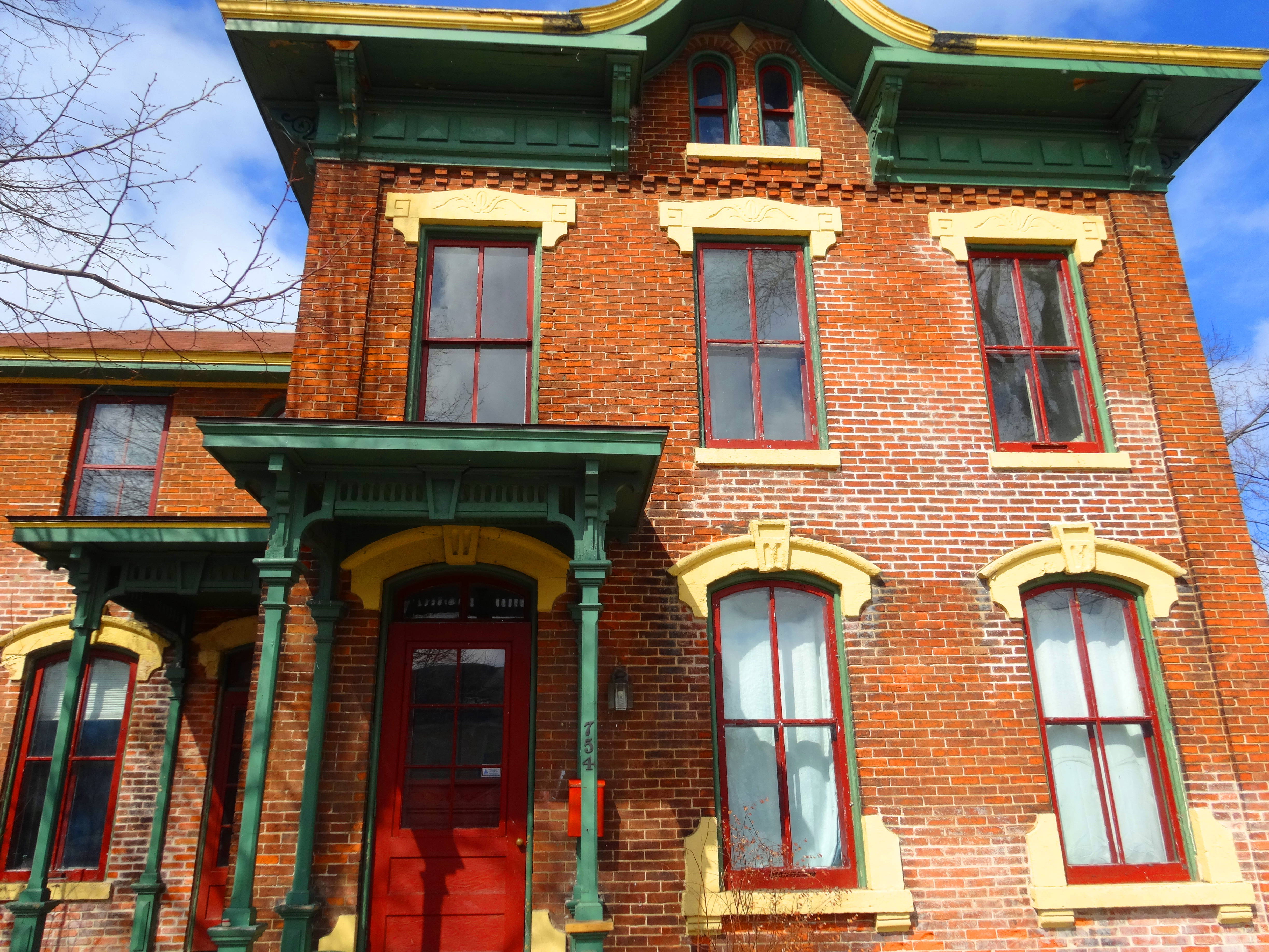 John George Ott House